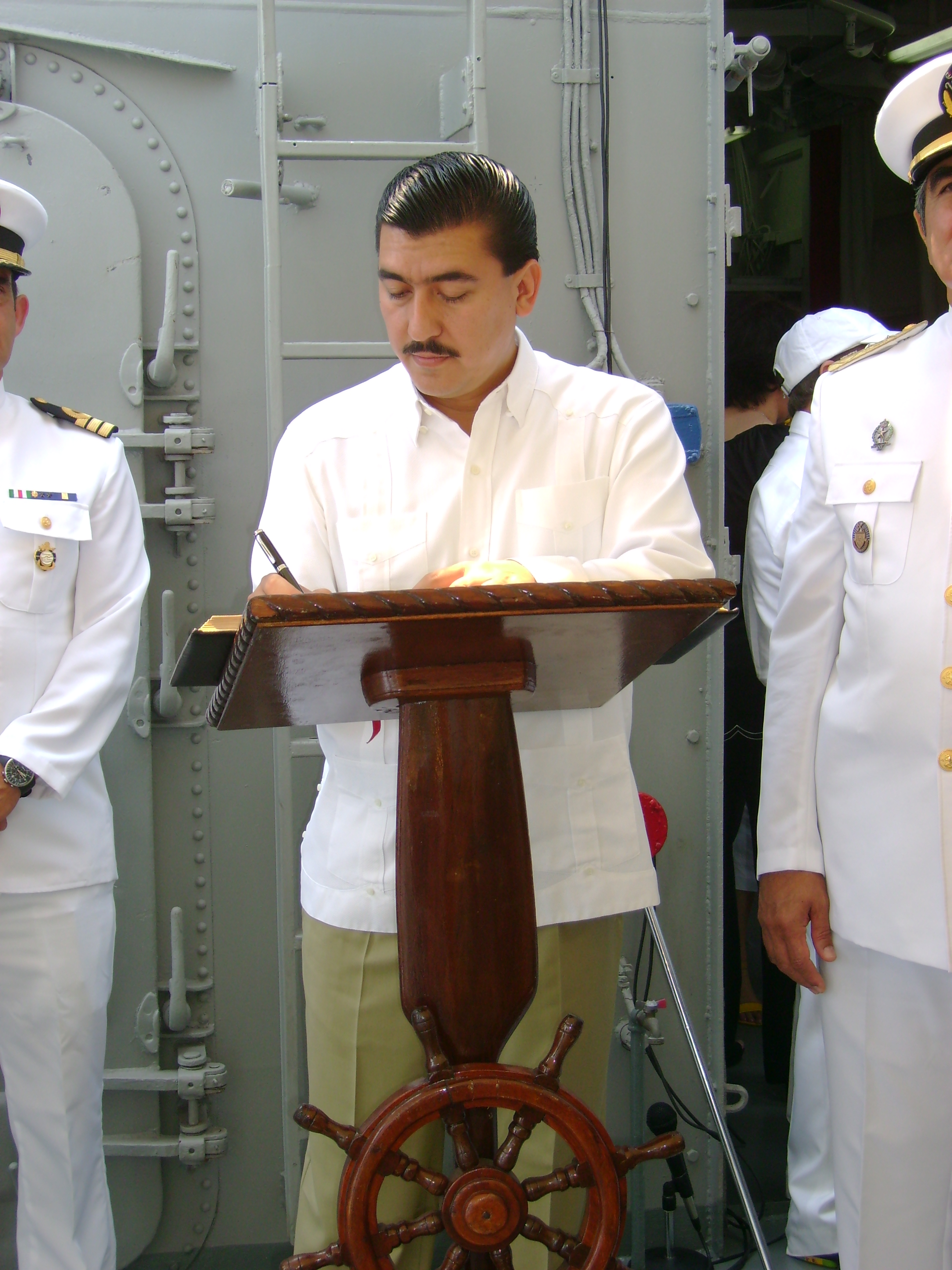 Lic. Jesús Silverio Cavazos Ceballos, Gobernador del estado de Colima, firmando el libro de visitantes distinguidos del ARM Netzahualcoyotl por el dia de la Marina.